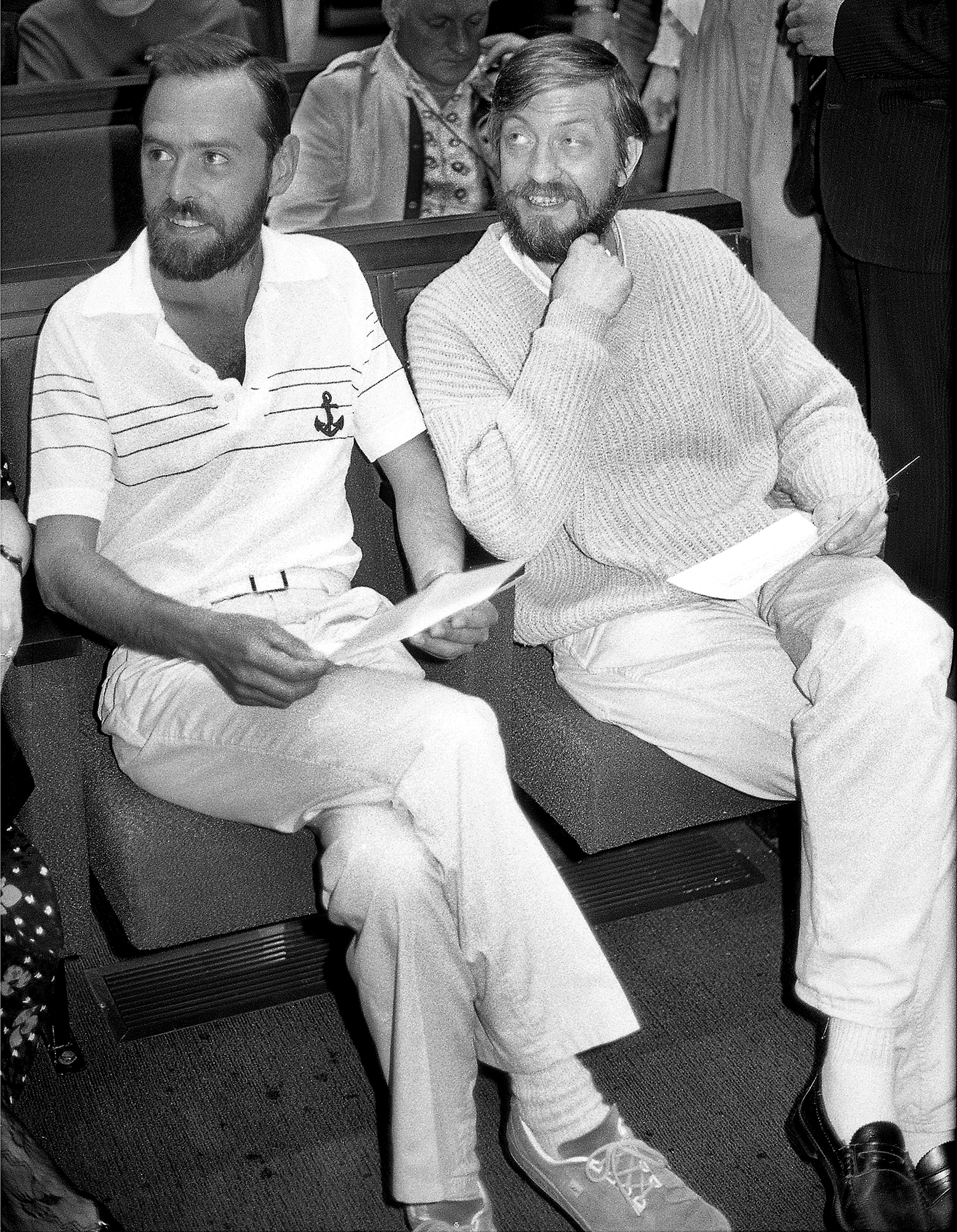 Jüri Krjukov ja Lepo Sumera Miss Estonia 88 žüriis